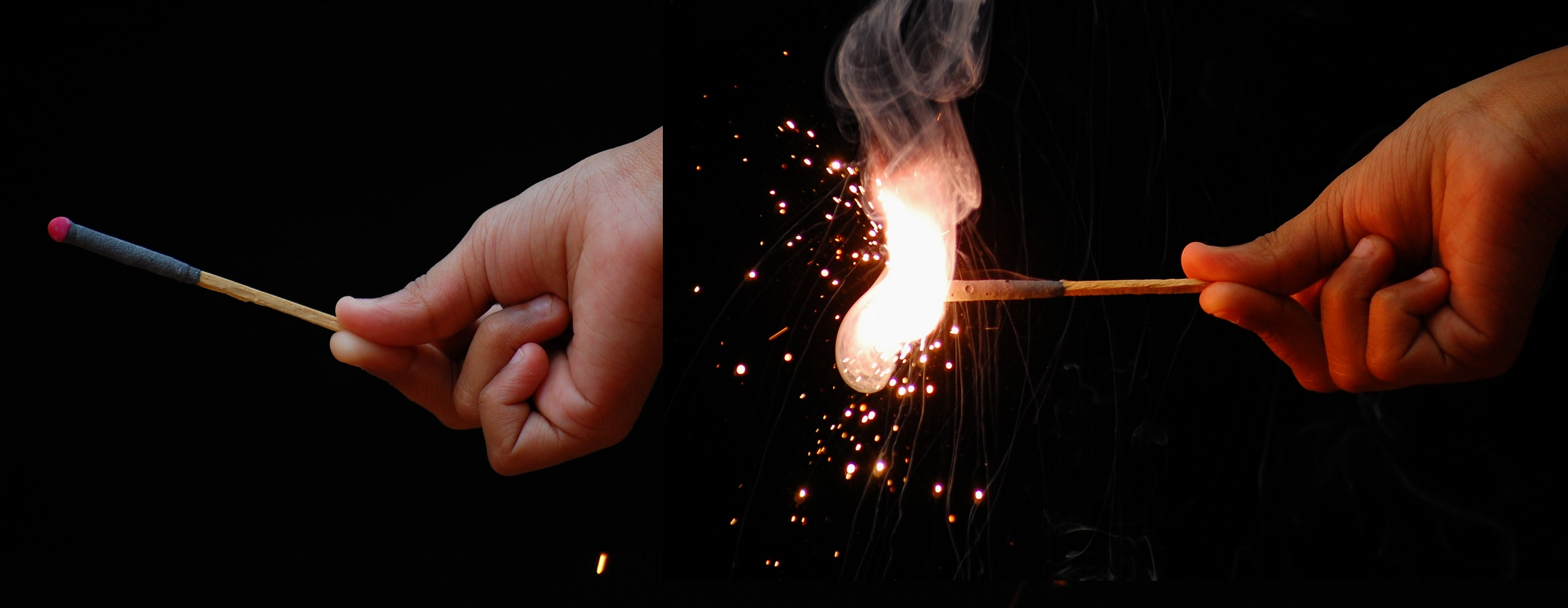 മത്താപ്പ്